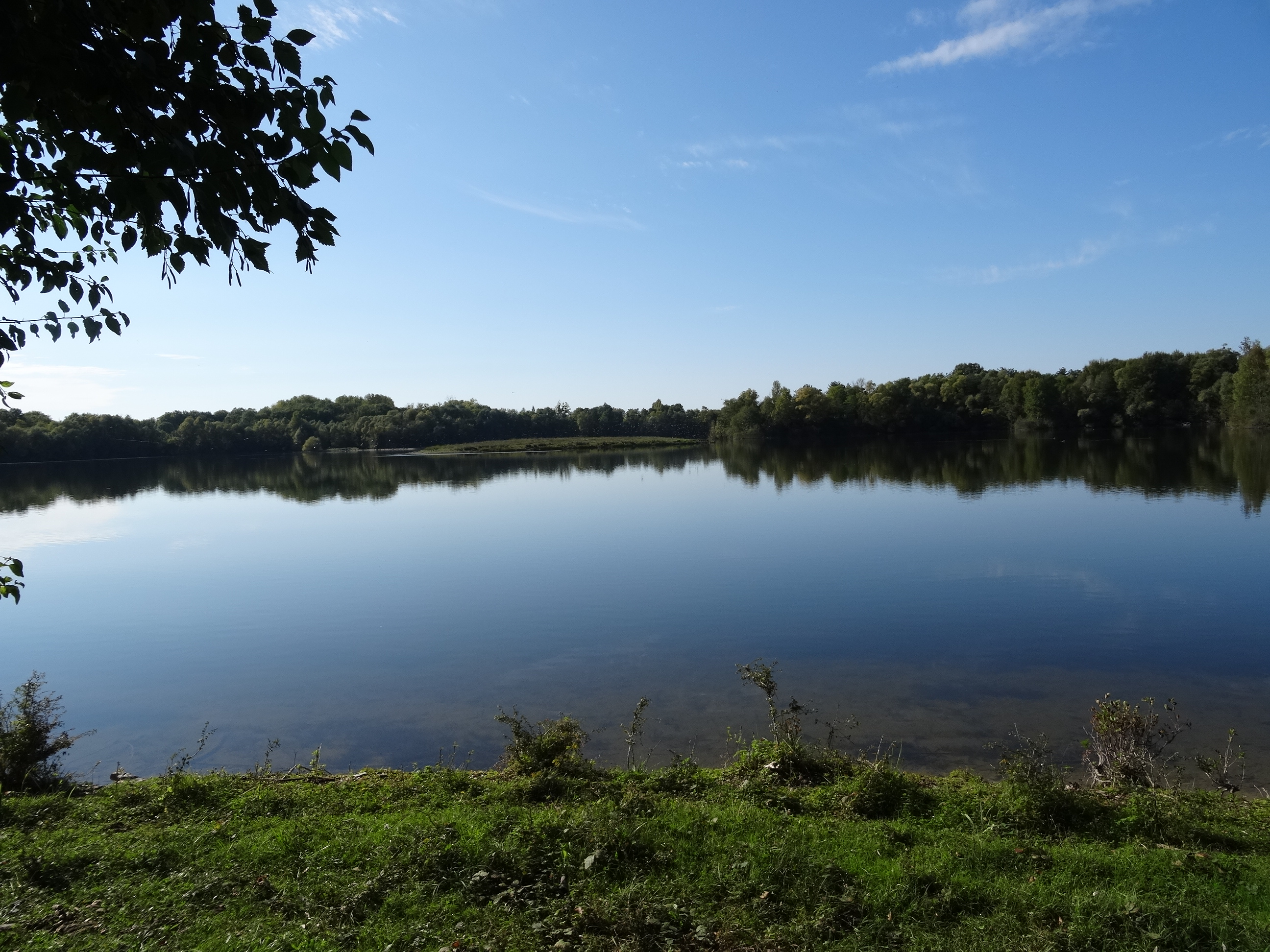 Ancienne gravière de la Plaine de Sorques. (Montigny-sur-Loing, Seine-et-Marne, région Île-de-France).